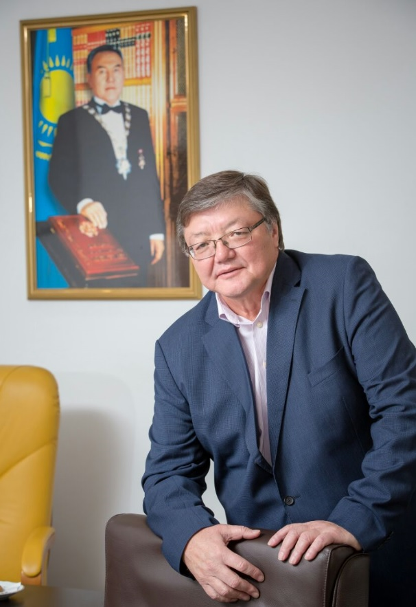 фото Ужкенова